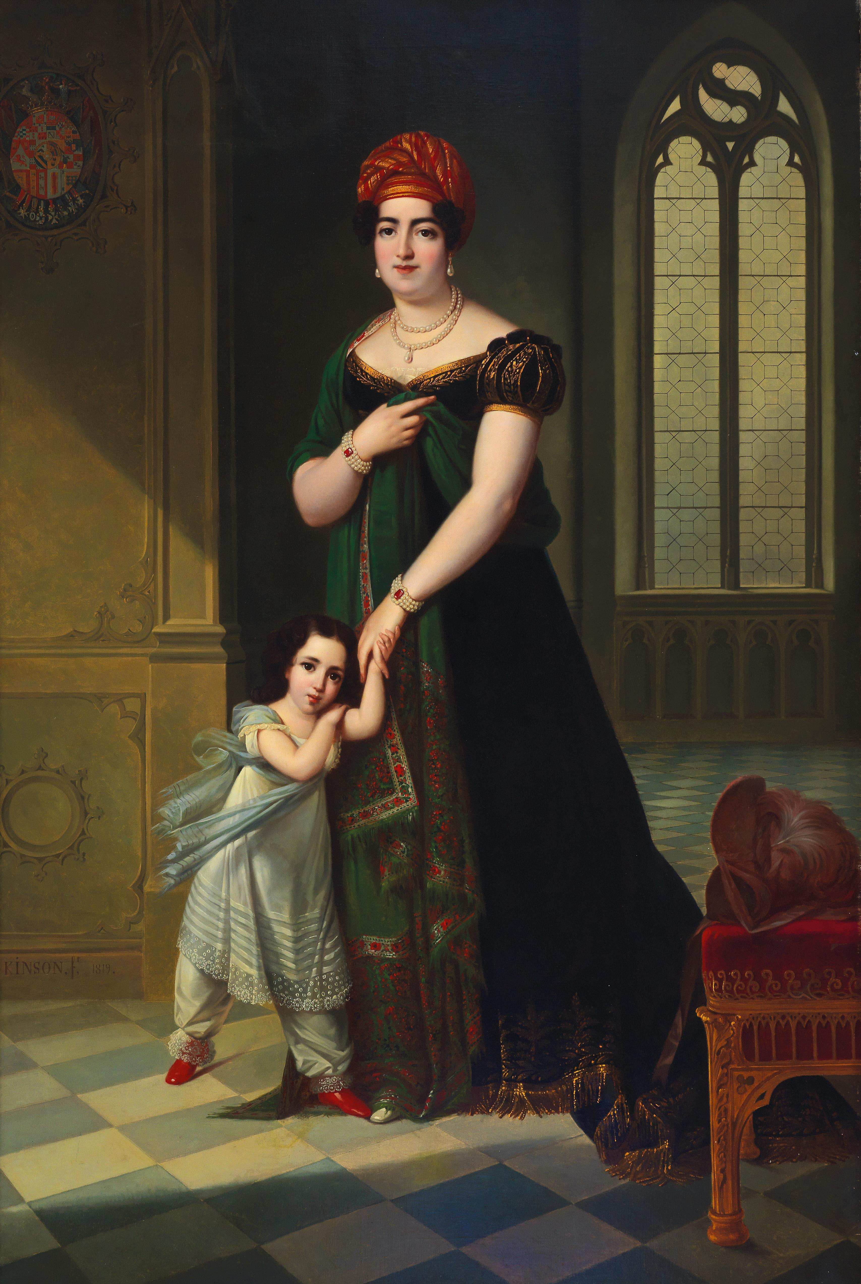 Dona Maria de la Piedad Roca de Togores Valcarcel, Duquesa de Frias (1787–1829) und ihr Sohn Bernardino Fernandez del Velasco y Roca de Togores, Marquis von Belmonte, signiert, datiert Kinson ft. 1819, Öl auf Leinwand, 220 x 147 cm (die zweite Ehefrau von Bernardino Fernández de Velasco y Benavides, Duque de Frias)